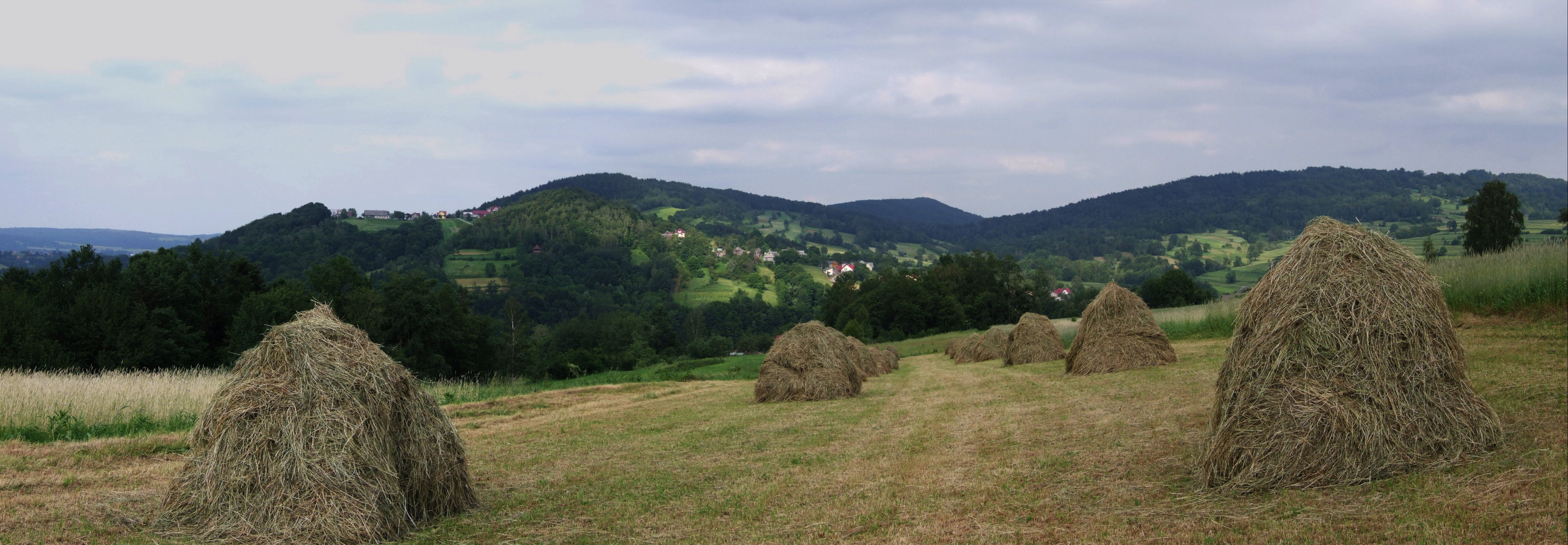 Widok z szosy Rajbrot-Muchówka przez Paprotną na Pasmo Szpilówki. W kierunku od lewej widoczne są: Dominiczna Gora, Piekarska Góra, Rogozowa